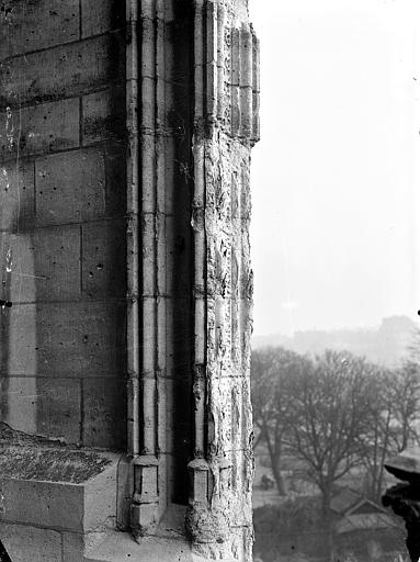 Pinacle de la façade sud : Détail montrant l'effritement et la désagrégation de la pierre